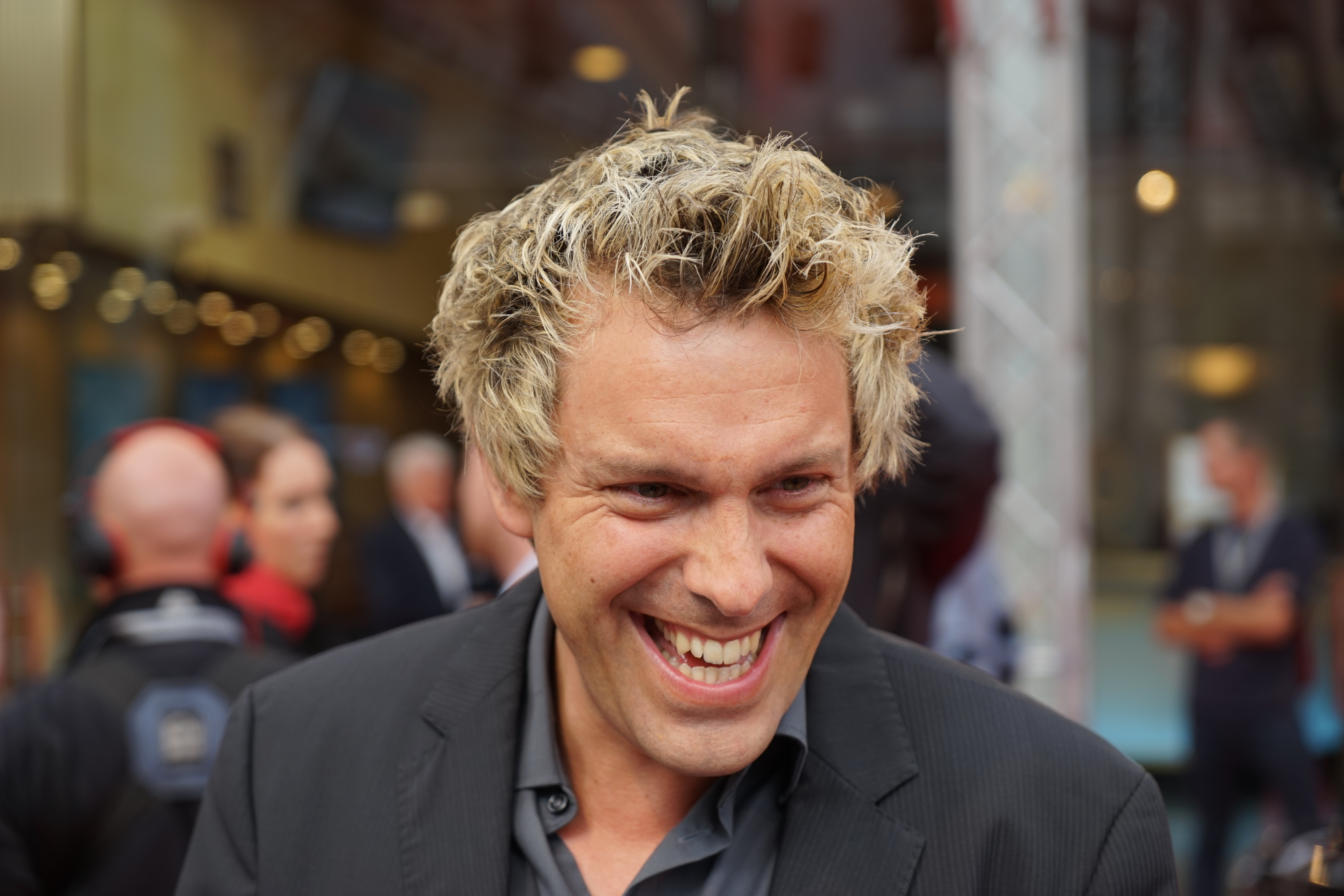 Sascha Grammel auf der Premiere des Films "Der Siebte Zwerg" am 21. September 2014